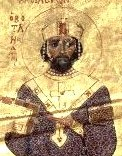 Nikephorus III